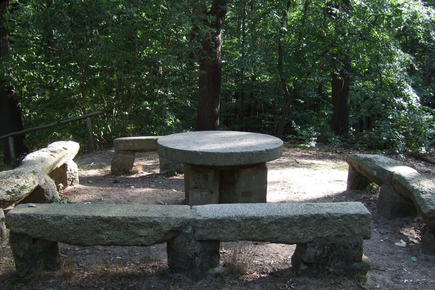 Steinerner Tisch in den Rauener Bergen